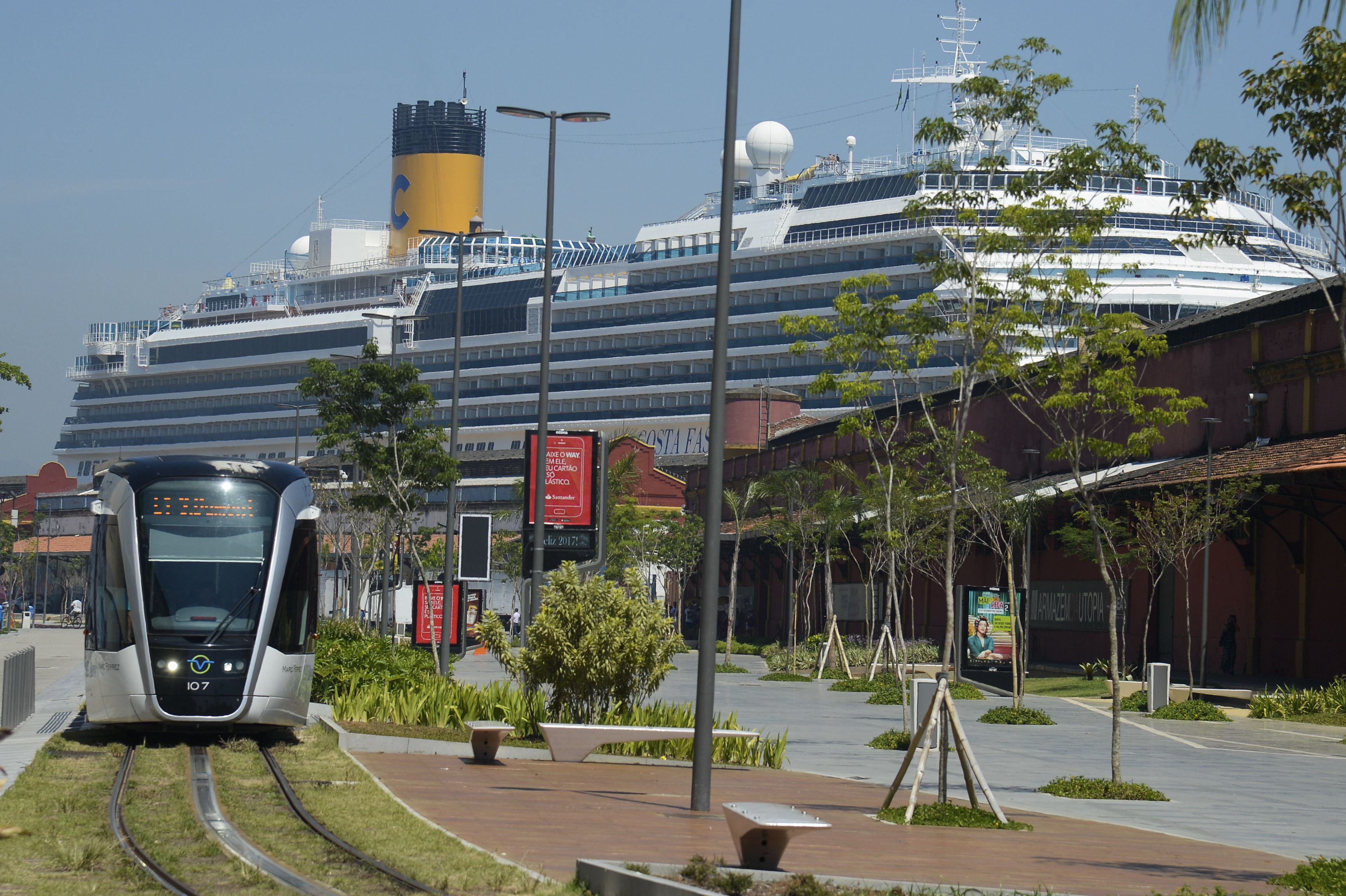 Rio de Janeiro - Turistas desembarcam de navios, no Píer Mauá, para os festejos do réveillon